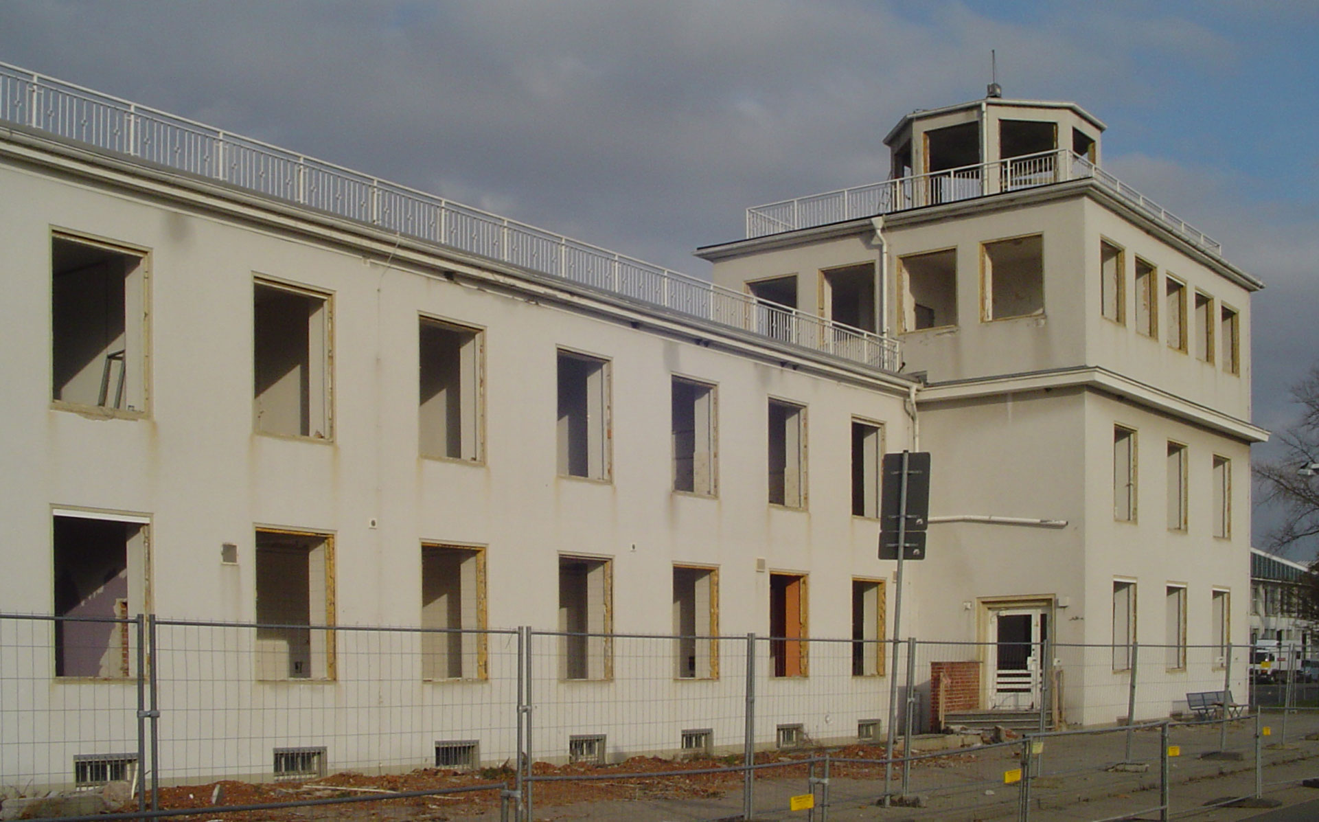 Nach nur einjähriger Planungs- und Bauzeit entstand 1935 eine vorbildliche Flughafenanlage vor den Toren der Stadt auf den Fluren von Klotzsche und Rähnitz: der Flughafen Dresden. Architektonisches Wahrzeichen wurde das seinerzeit elegante Abfertigungs- und Verwaltungsgebäude, nach der Deutschen Lufthansa AG als "Hansahaus“ bezeichnet. Der Abriss erfolgte im Jahr 2010.